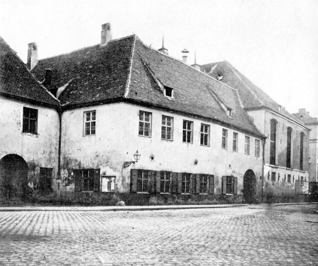 Das alte Königliche Hofbräuhaus oder Weiße Hofbräuhaus in München. In der Bildmitte sieht man das Verwaltungsgebäude, das Gebäude mit den drei hohen Fenstern rechts daneben ist das Sudhaus. Das Sudhaus wurde 1896 abgerissen und gegen die Schwemme des heutigen Hofbräuhauses ersetzt. Unmittelbar nach deren Fertigstellung wurde das Verwaltungsgebäude 1897 abgerissen und dort die Gaststätte des heutigen Hofbräuhauses errichtet.